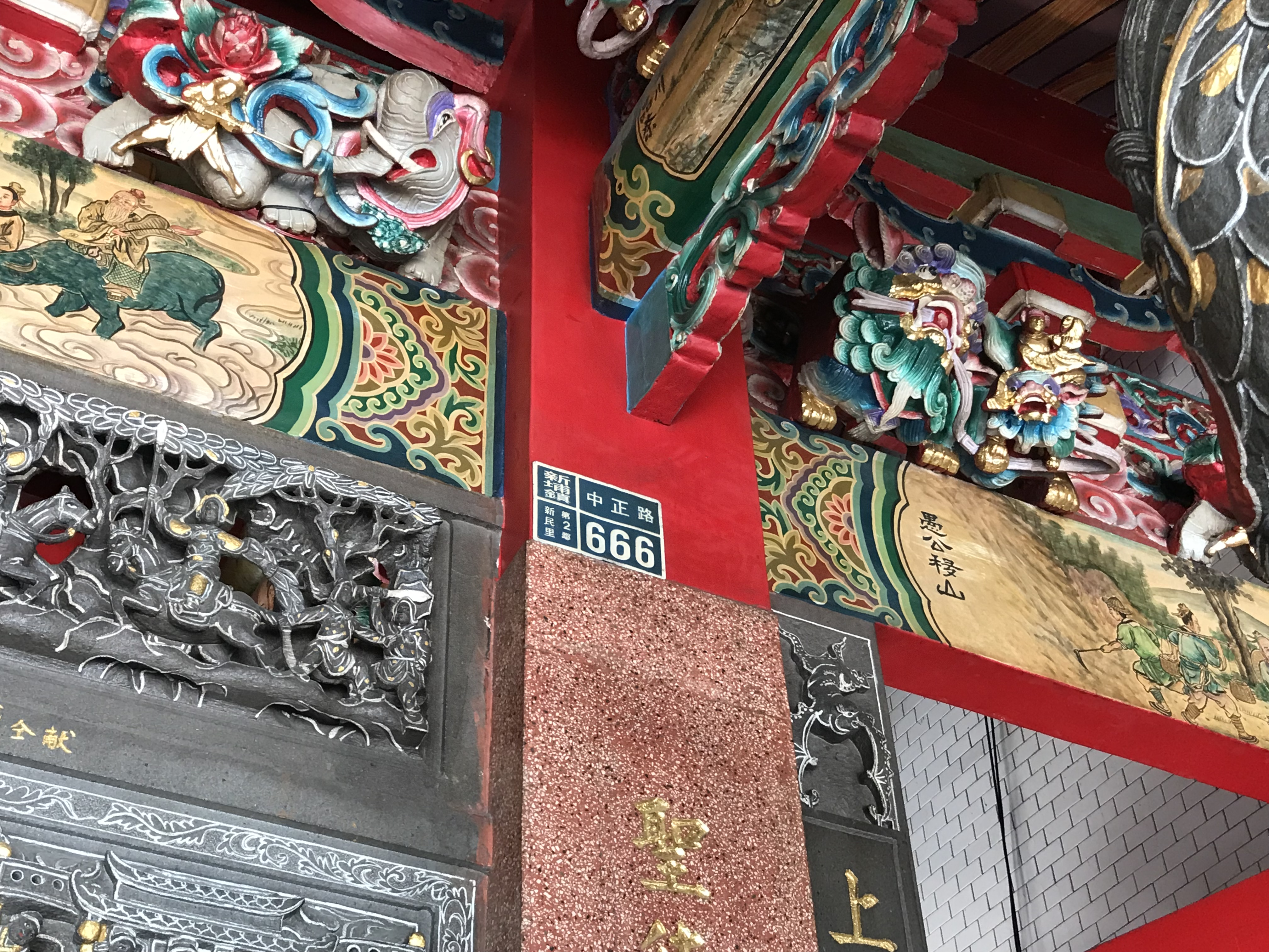 中文（台灣）: 新埔與天宮門牌